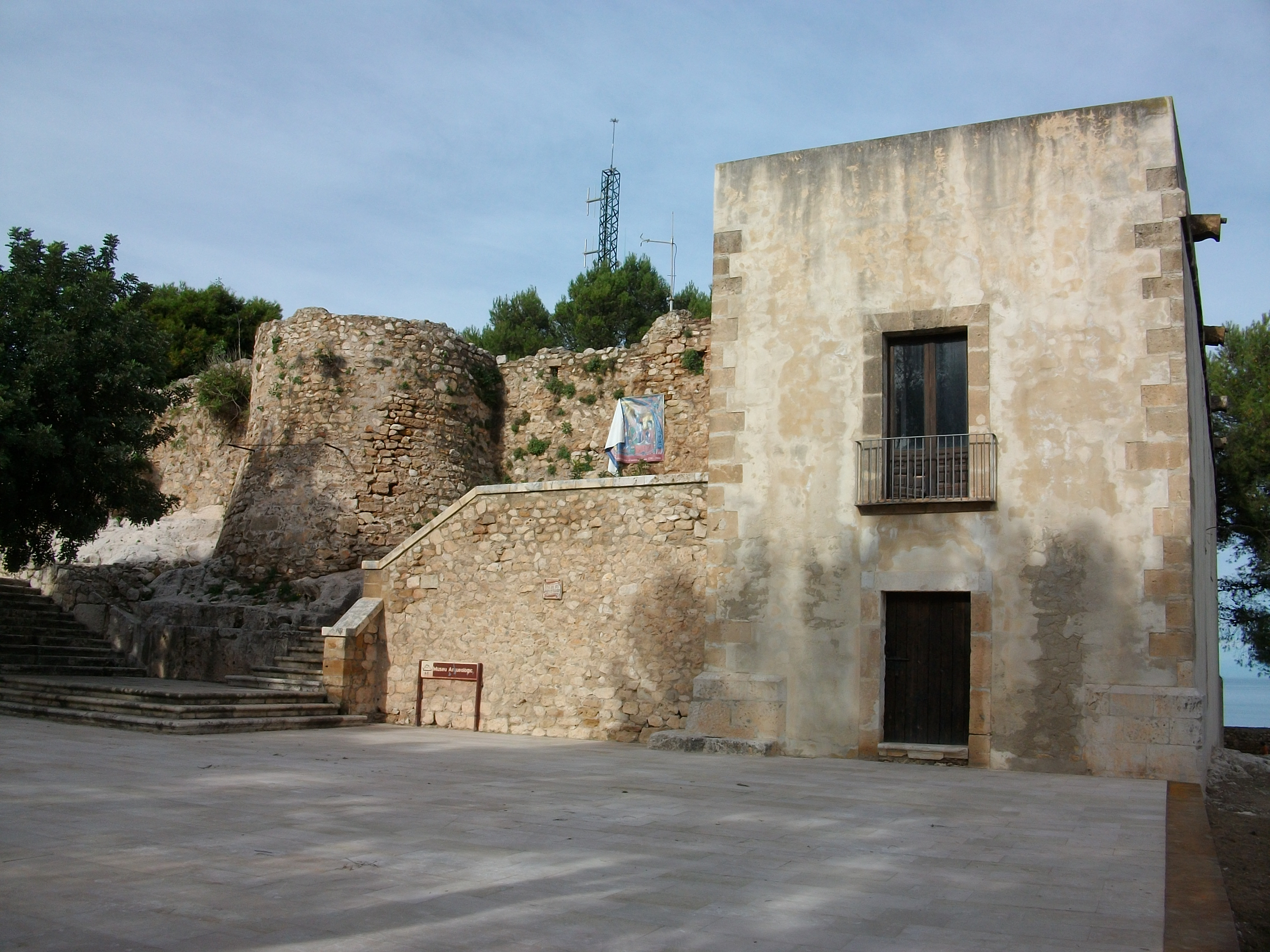 Palau del Governador (s. XVII) del Castell de Dénia, País Valencià.